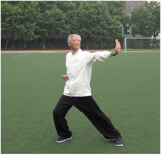 Abschnitt 7: Die Augen weit öffnen - Qi vermehren